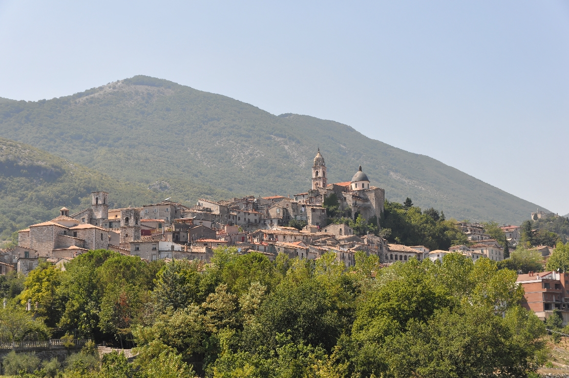 Cusano Mutri 2012 Dieses Foto entstand in Zusammenarbeit mit Stadtbesichtigungen.de Die Seiten Stadtbesichtigungen.de, der dazugehörige Reise Blog sowie die Facebookseite: Stadtbesichtigungen Rom dürfen dieses Bild für Ihre Veröffentlichungen ohne den Hinweis auf Wikipedia, Commons bzw der Lizenz verwenden. Die Verantwortlichen habe von mir (Ra Boe) die Originaldaten zur freien Verfügung übermittelt bekommen.